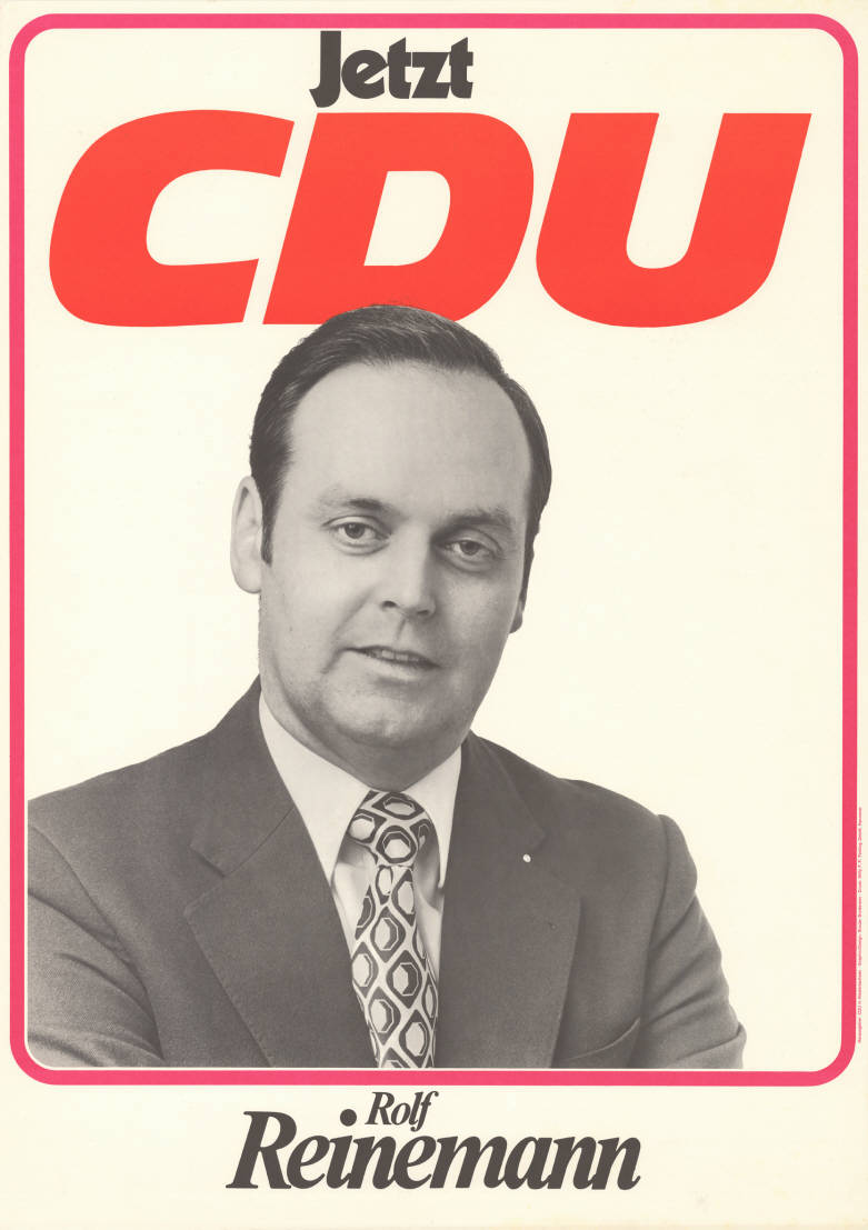 Jetzt CDU Rolf Reinemann Abbildung: Porträtfoto Plakatart: Kandidaten-/Personenplakat mit Porträt Künstler_Grafiker: Graphic Design Broder Brodersen, Hannover Auftraggeber: CDU in Niedersachsen Drucker_Druckart_Druckort: Wiily F.P. Fehling GmbH, Hannover Objekt-Signatur: 10-008 : 376 Bestand: Landtagswahlplakate Niedersachsen (10-008) GliederungBestand10-18: Landtagswahlplakate Niedersachsen (10-008) » CDU Lizenz: KAS/ACDP 10-008 : 376 CC-BY-SA 3.0 DE